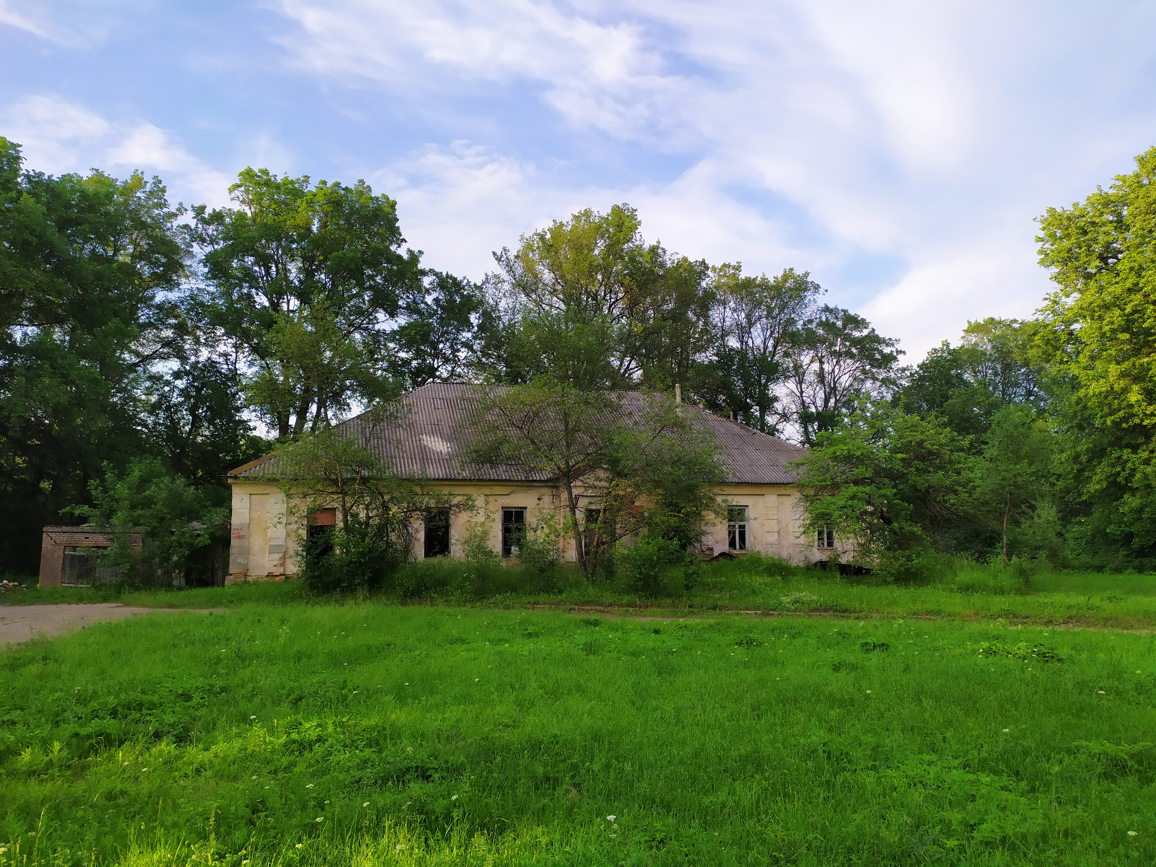 Сёмкава, сядзіба Хмараў.